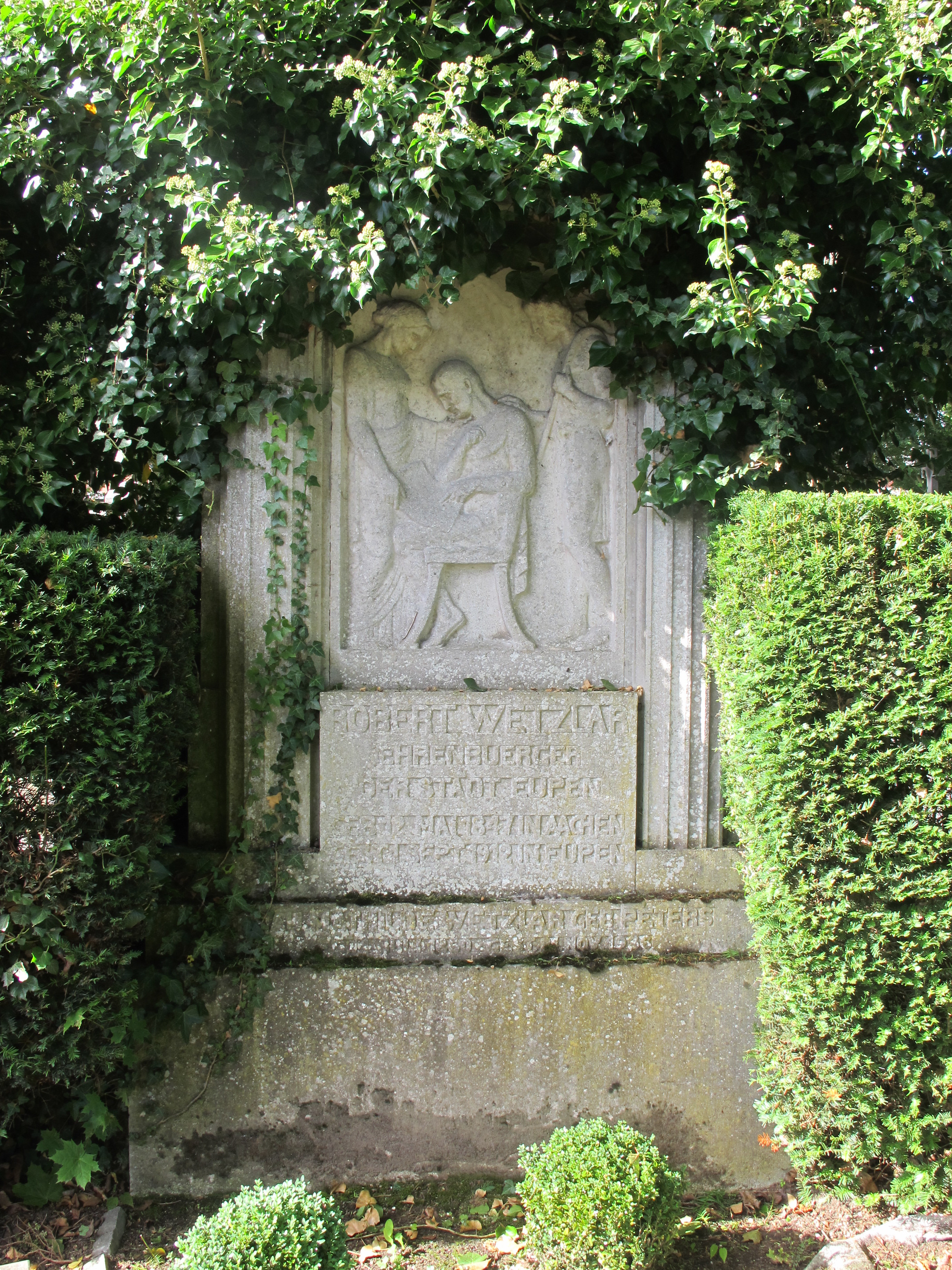 Grabstätte des Ehepaares Robert Wetzlar, Industrieller, Stifter und Ehrenbürger der Stadt Eupen.